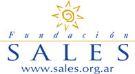 Logotipo de la Fundación SALES